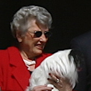 Prinsesse Astrid fru Ferner – og hunden ved vindauge på Slottet 17. mai 2007